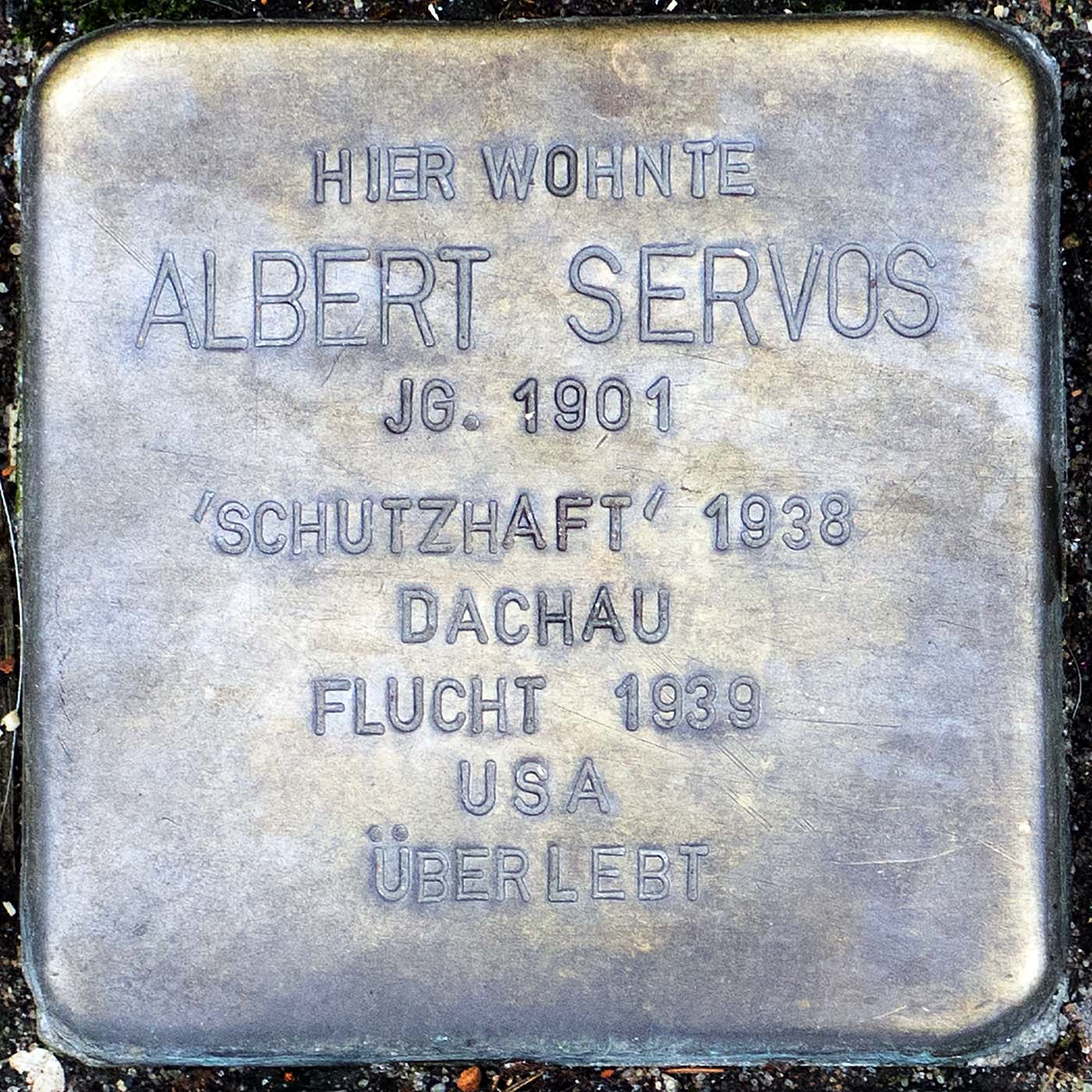 Stolperstein für Albert Servos (Willich)